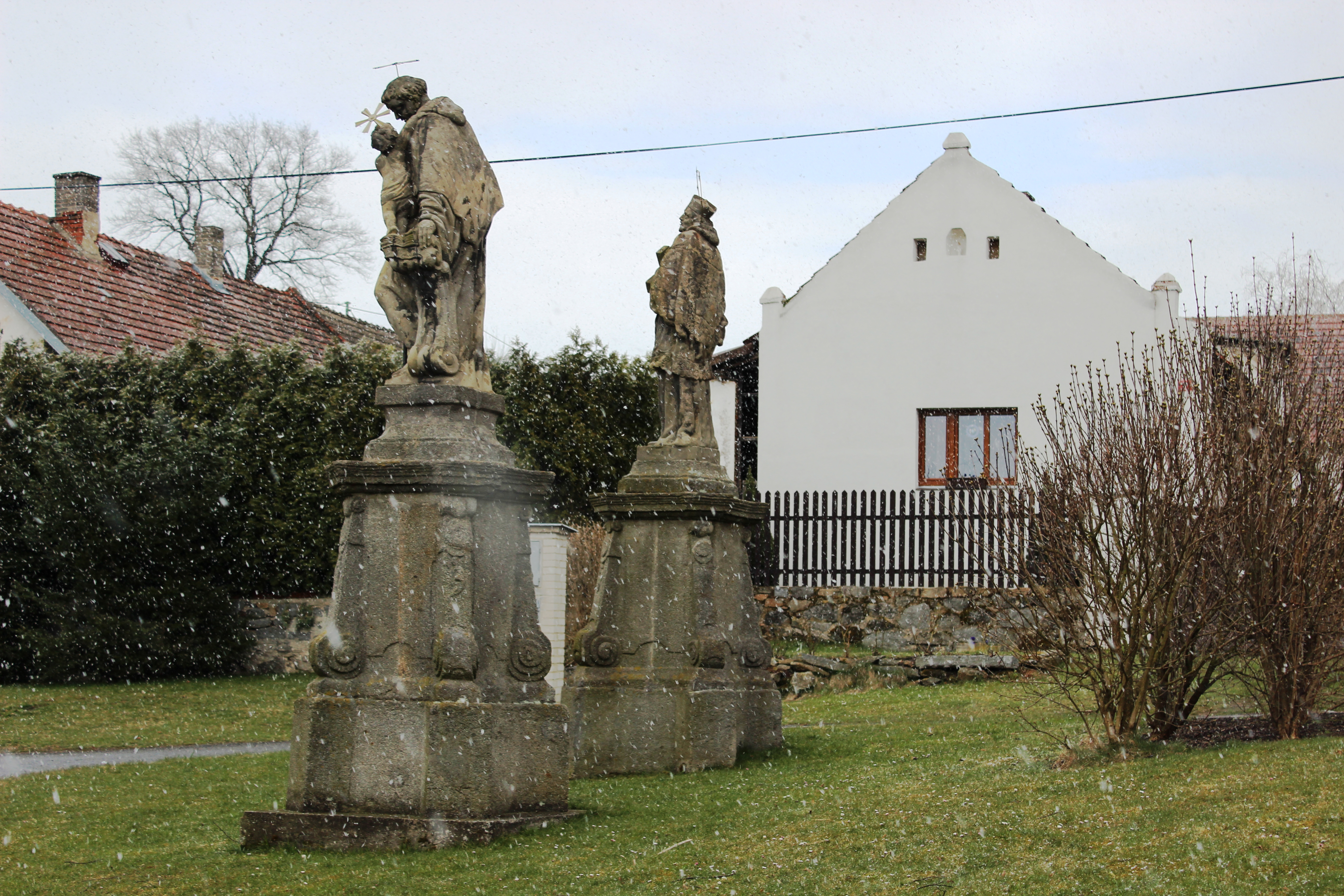 Sochy svatého Jana Nepomuckého a svatého Antonína Paduánského. Štětkovice. Okres Příbram. Česká republika.